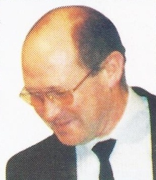 Portrait de Gilles Mallet, aumônier de la Fédération sportive et culturelle de France